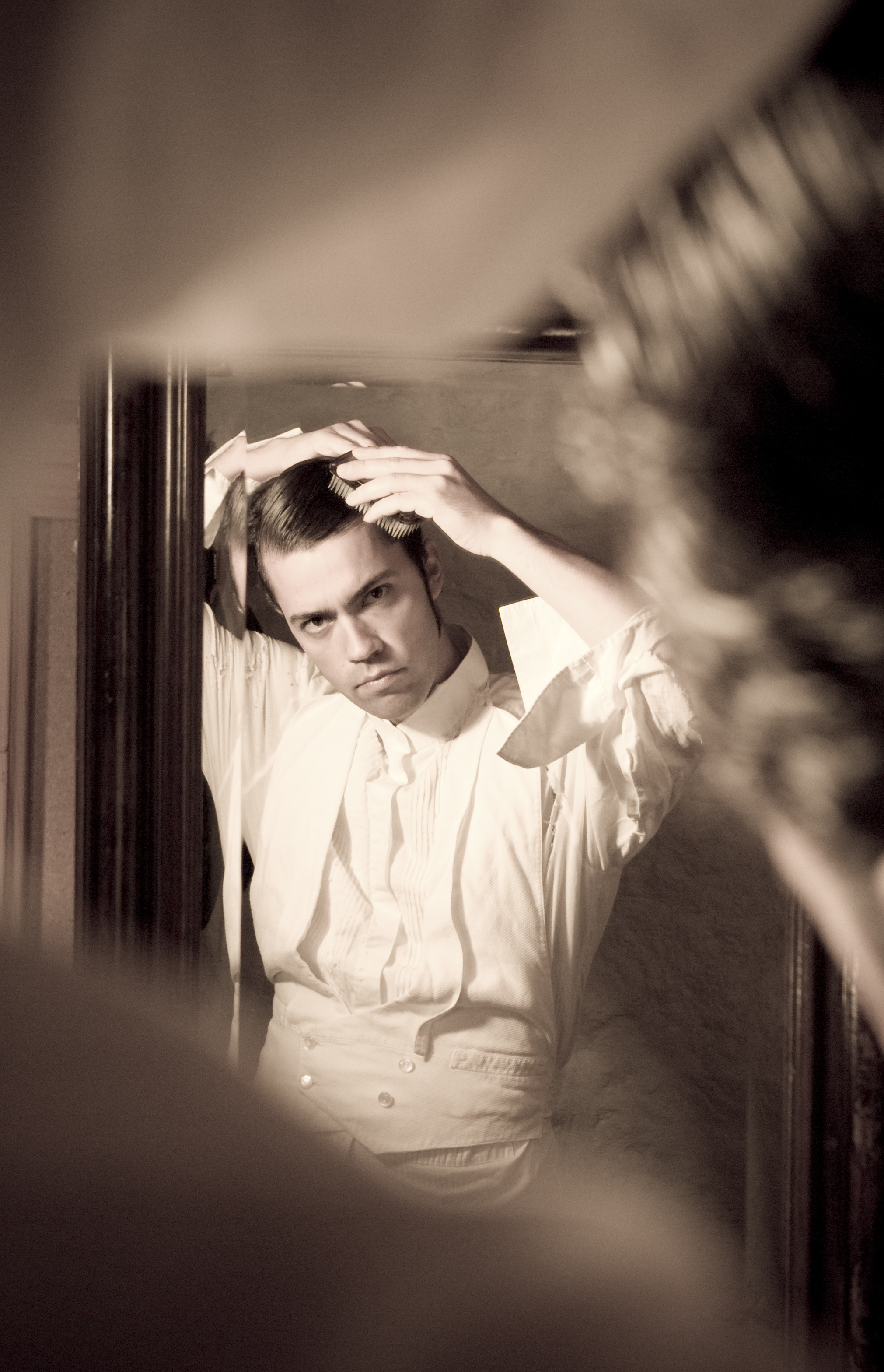 Kjetil Grande